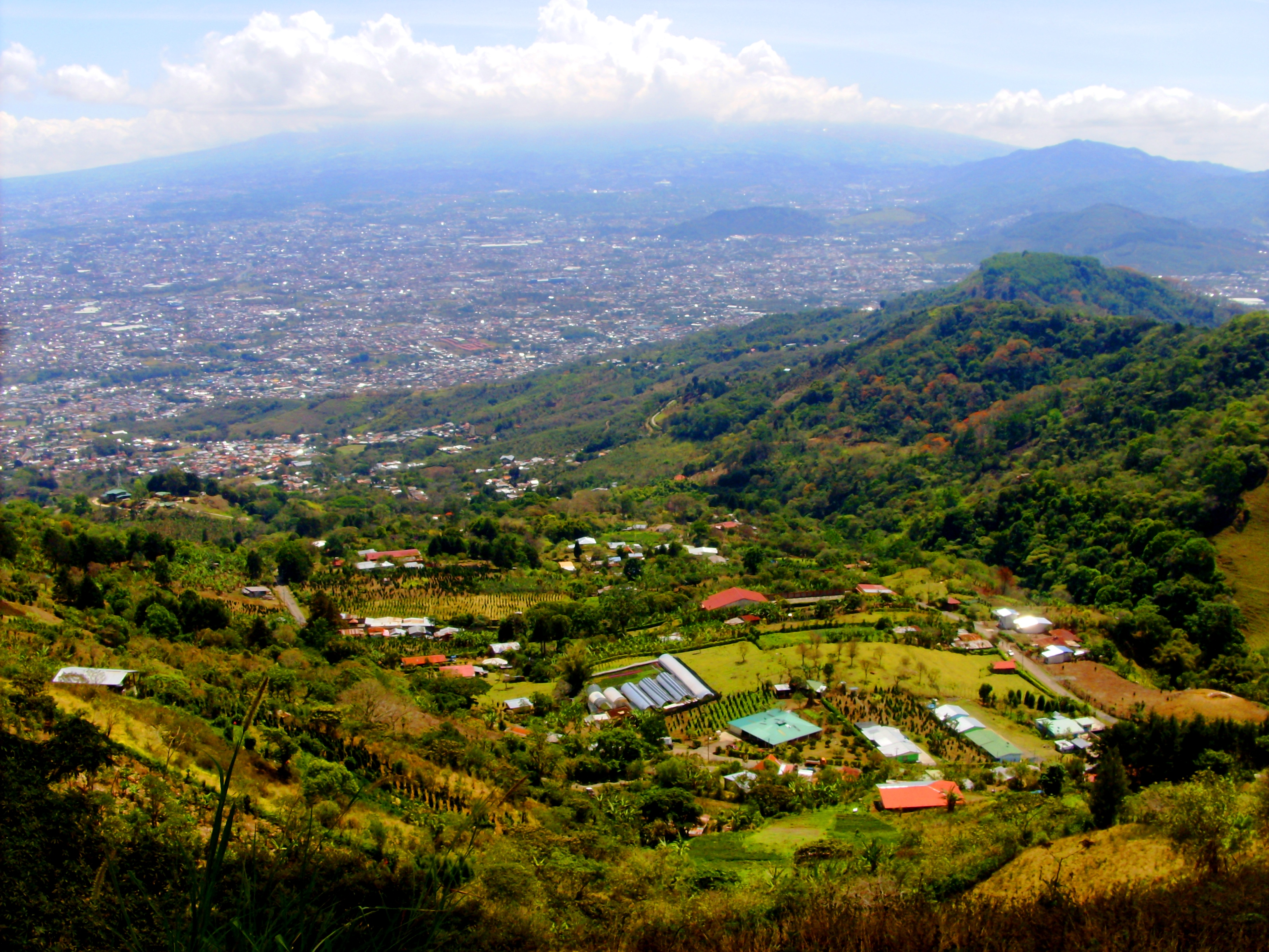 Panorámica desde el Monte de la Cruz.